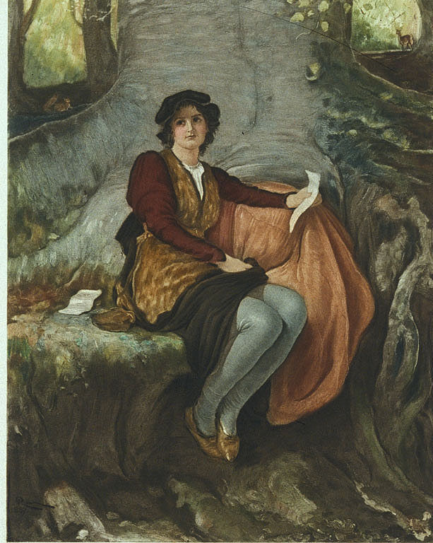 Rosalind